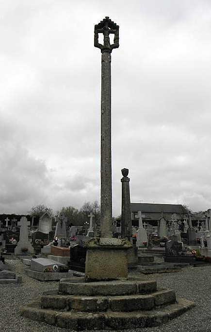 Calvaire du cimetière de Gahard (35).